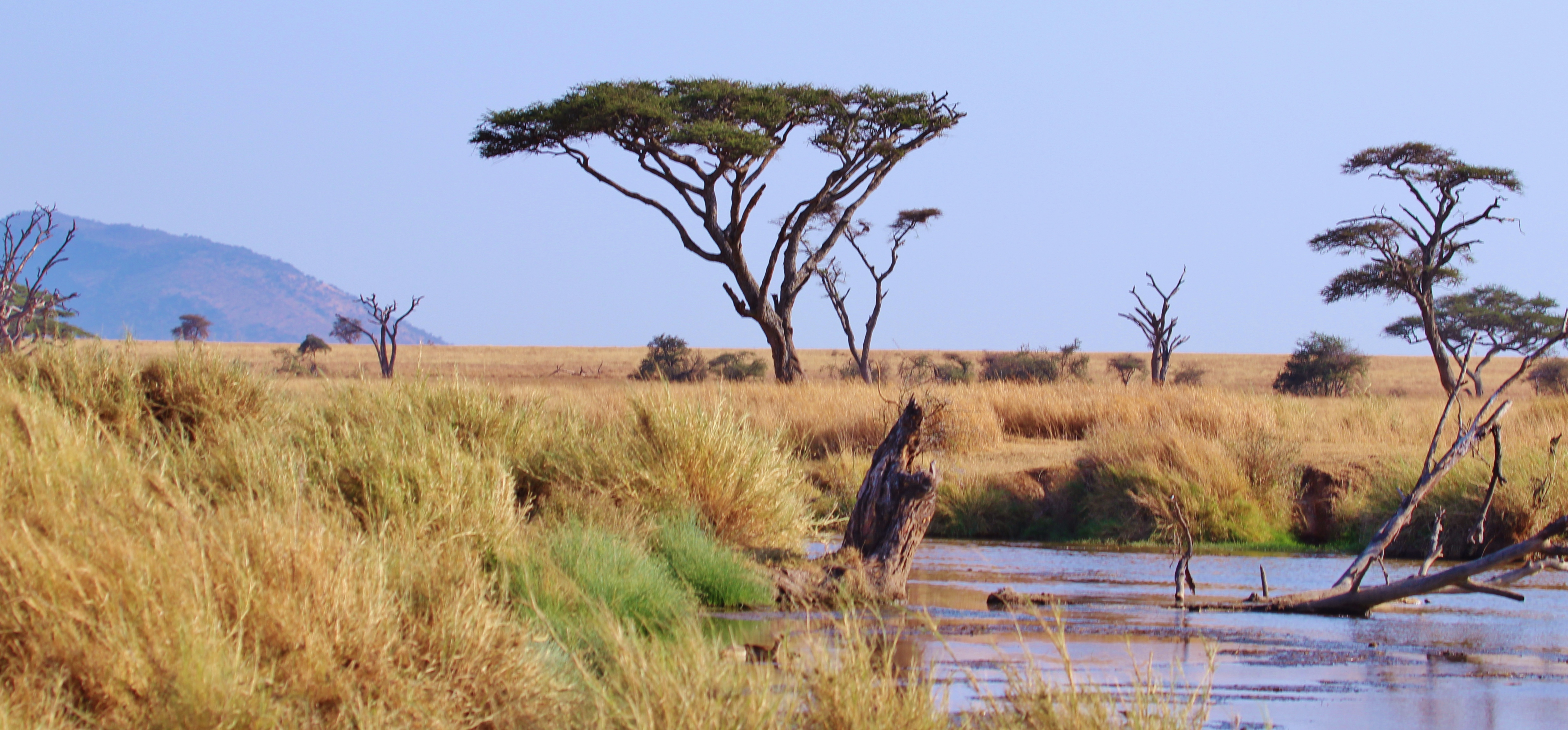 Serengeti National Park, Tanzania